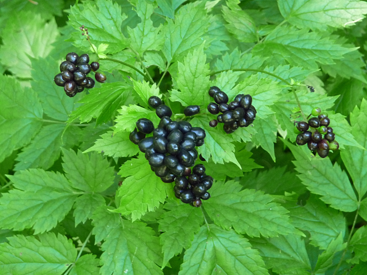 Beeren des Christophskrauts bei Scheuereck, Bayerischer Wald